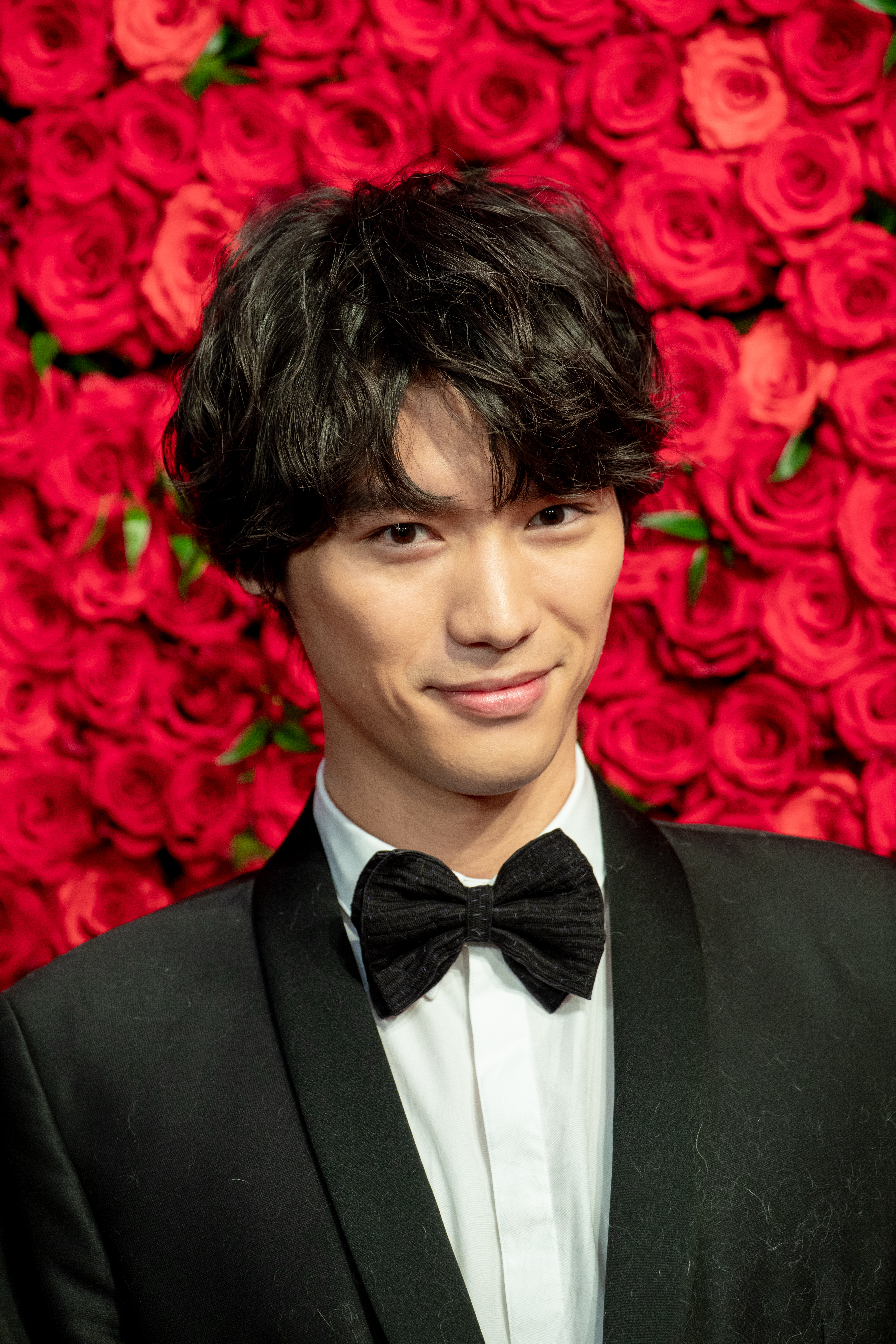 第30回 東京国際映画祭 オープニングセレモニー 福士蒼汰 (旅猫リポート)